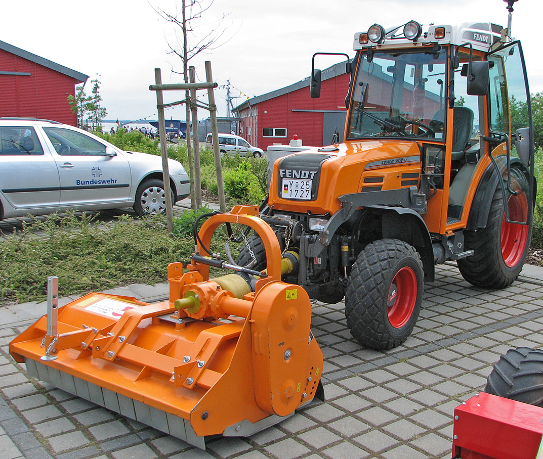 Dieses Bild zeigt einen Fendt Vario 207 V.